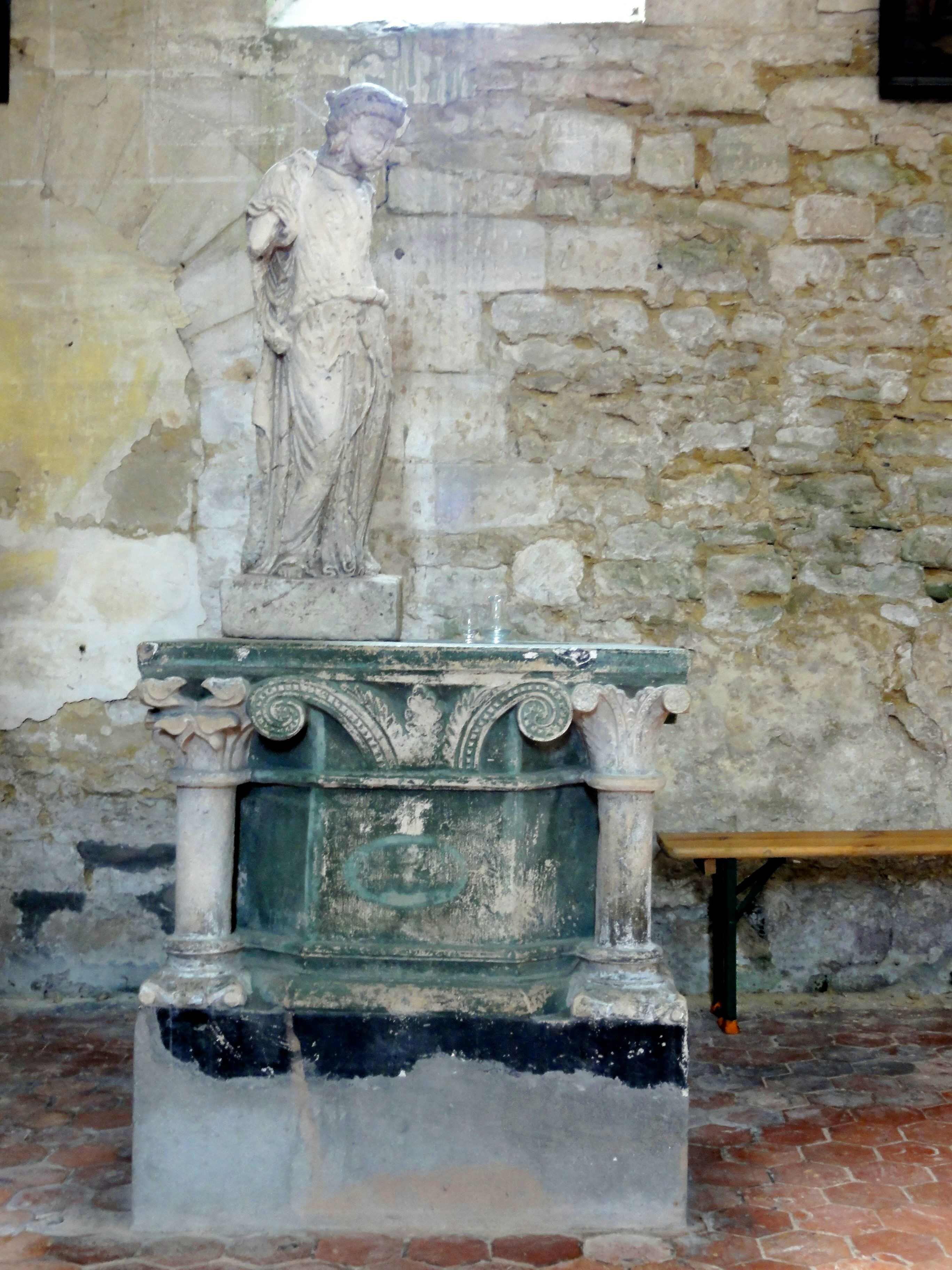 Fonts baptismaux.